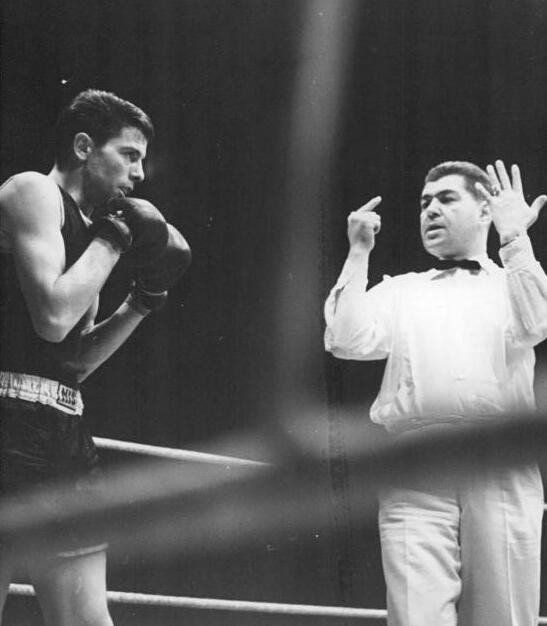 B. Stankovic Zentralbild Kohls 20.2.1963 Hoher Boxsieg des TSC Berlin Eindeutig mit 16:4 Punkten besiegte die Boxstaffel des TSC Berlin am 19.2.63 in der Berliner Werner-Seelenbinder-Halle vor 4000 Zuschauern den jugoslawischen Vizemeister Radnicki NIS. UBz: (Federgewicht) B.Stankovic, der gegen Schneider nach Punkten verlor, wird stehend angezählt.